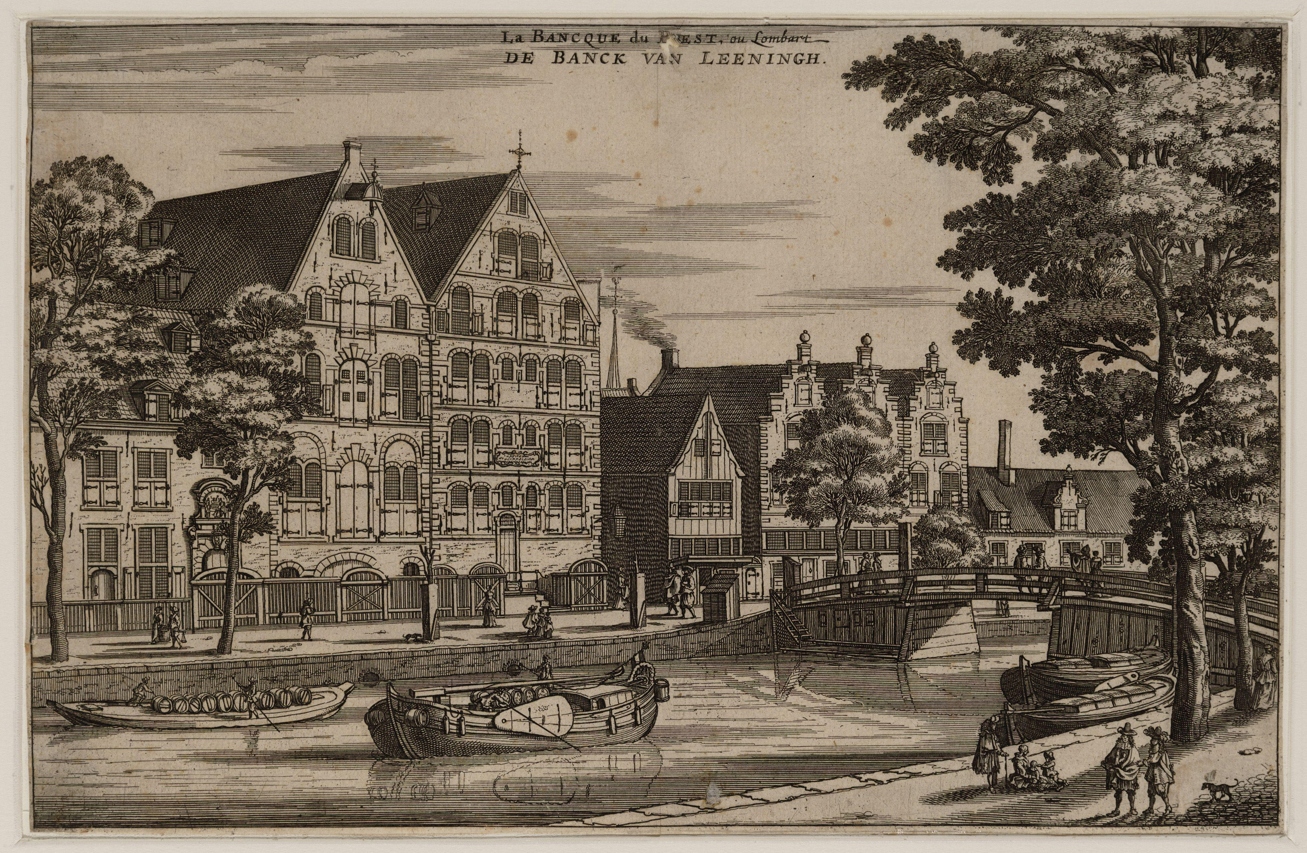 Stadsbank van Lening aan de Oudezijds Voorburgwal, Amsterdam. engraving. Amsterdam, Stadsarchief Amsterdam, collectie tekeningen en prenten.